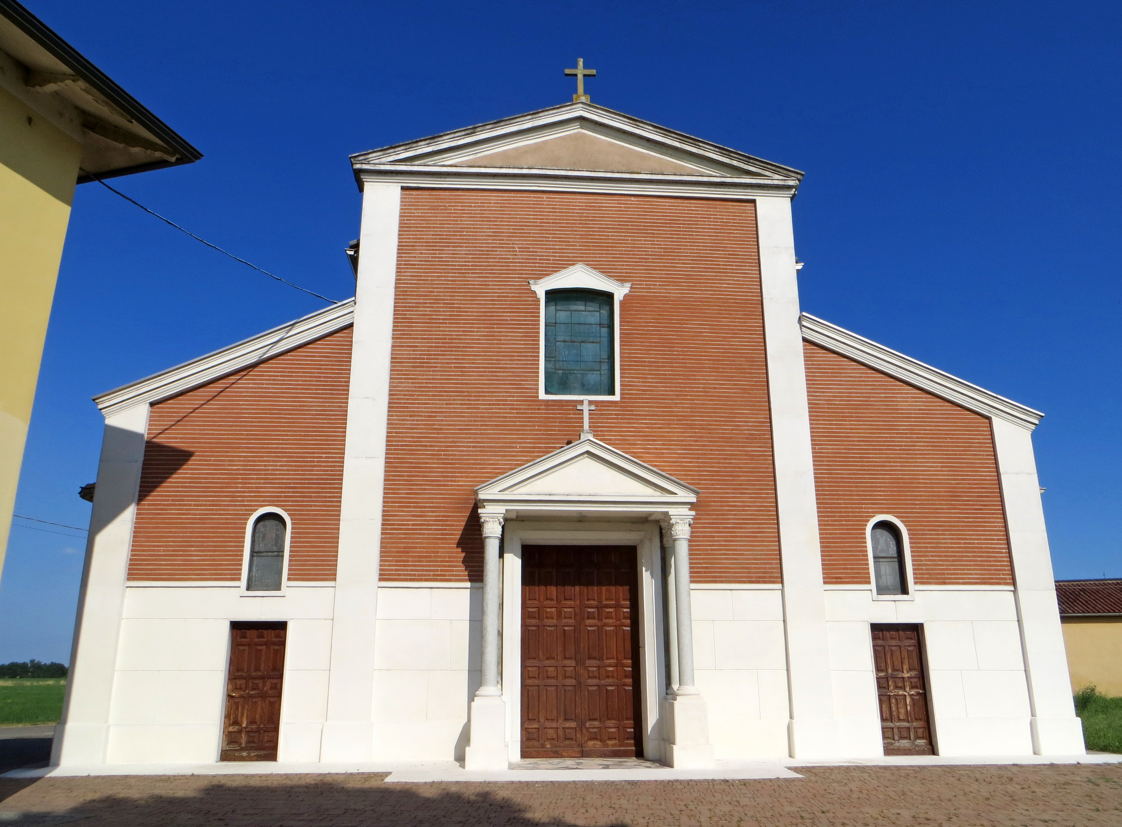 Chiesa di Sant'Andrea (Sant'Andrea, Busseto) - facciata